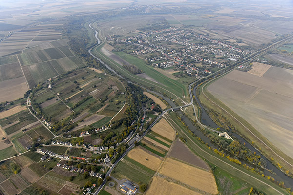 Sióagárd látképe a levegőből